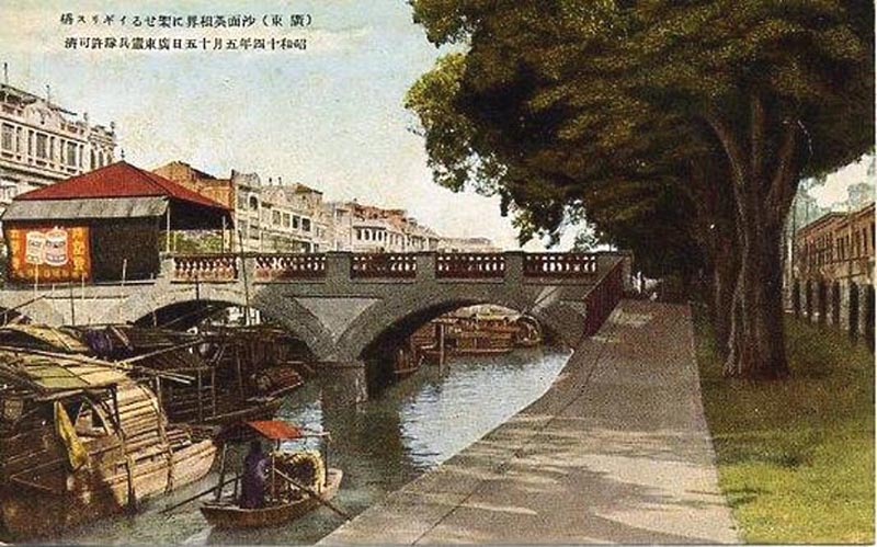 廣州市沙面島西橋。